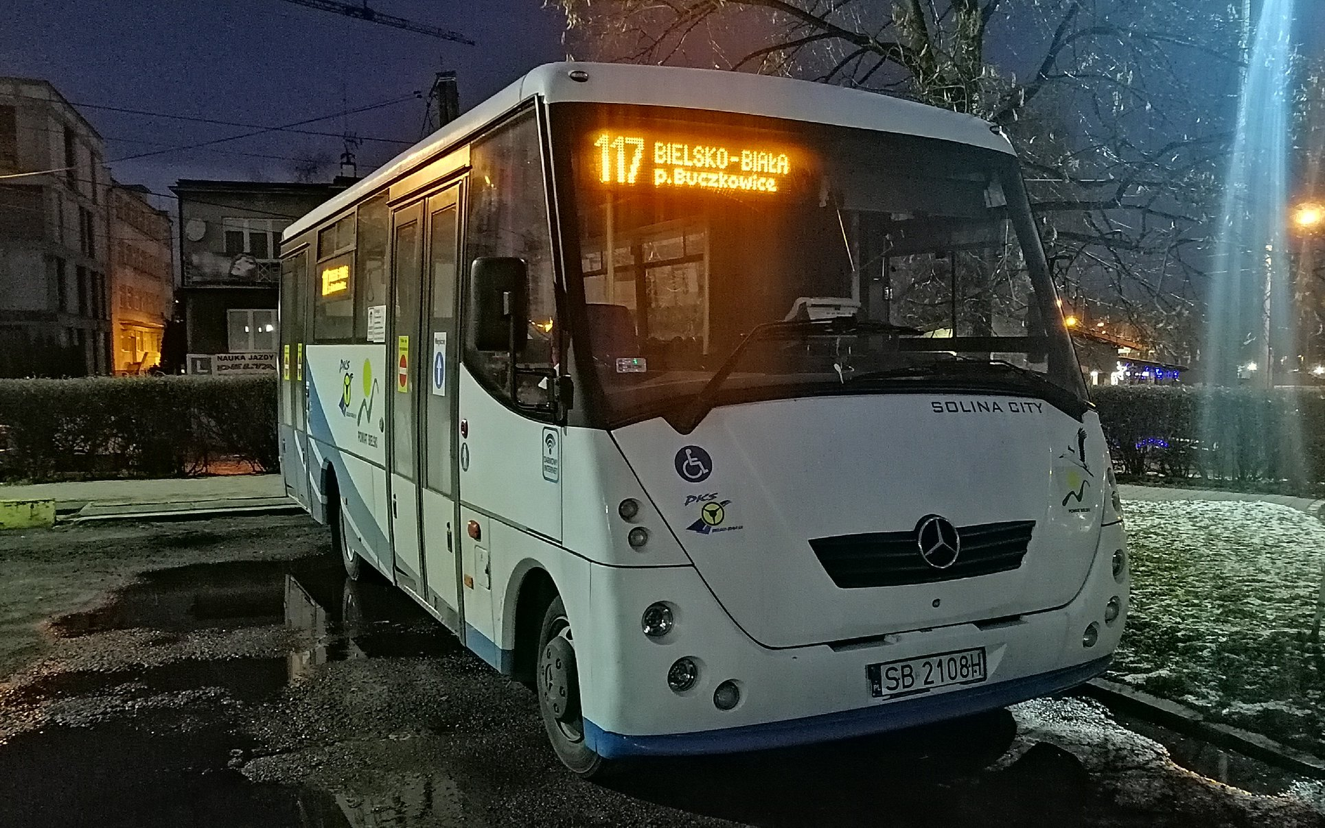 Autosan H7 w PKS Bielsku-Białej trasa w linii komunikacji